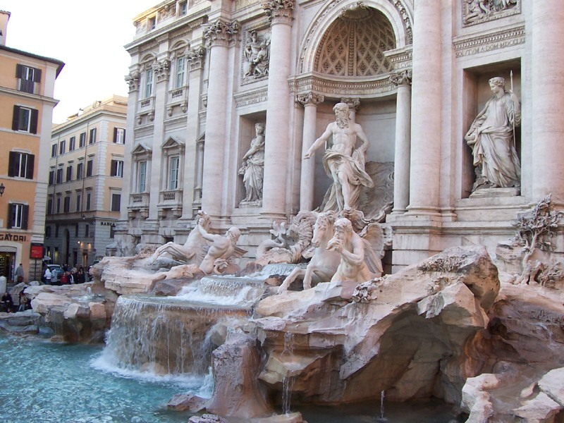 Roma - Fontana di Trevi